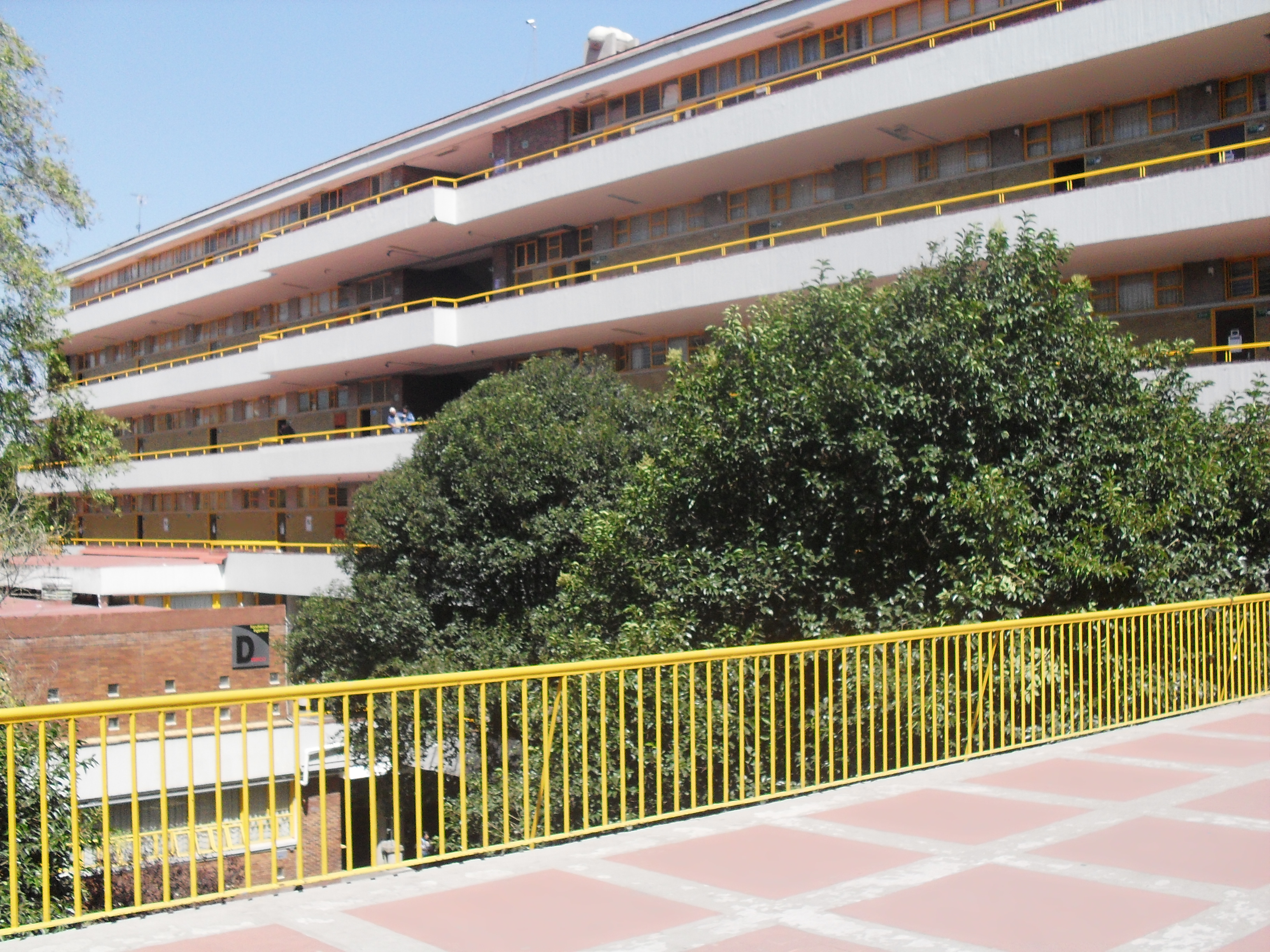 Vista trasera del edificio principal donde se aprecian los 4 niveles con salones.